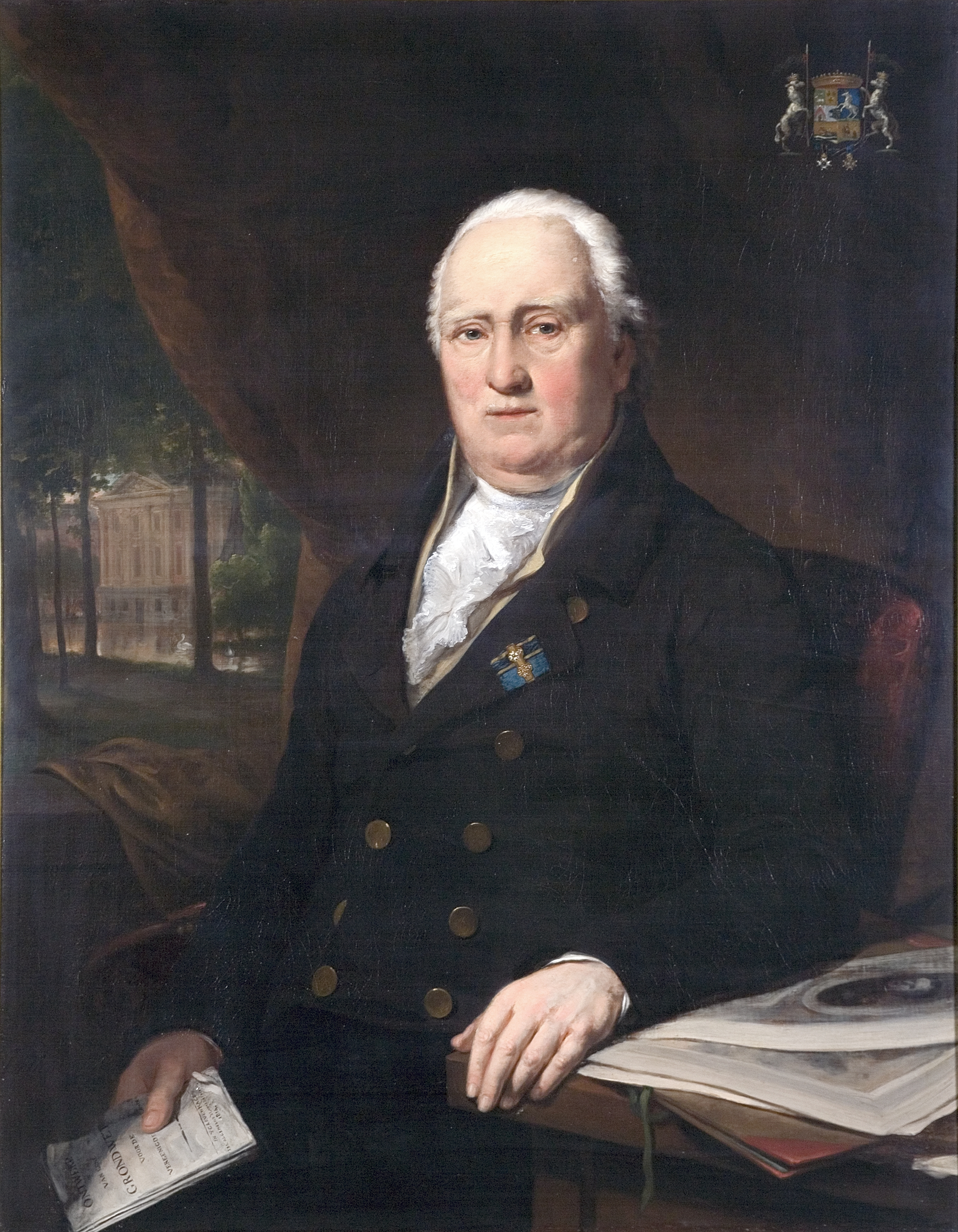 Jan Willem Pieneman